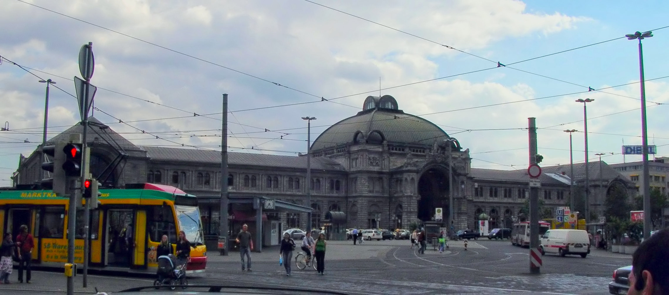 Nürnberg Hauptbahnhof, 2005-07